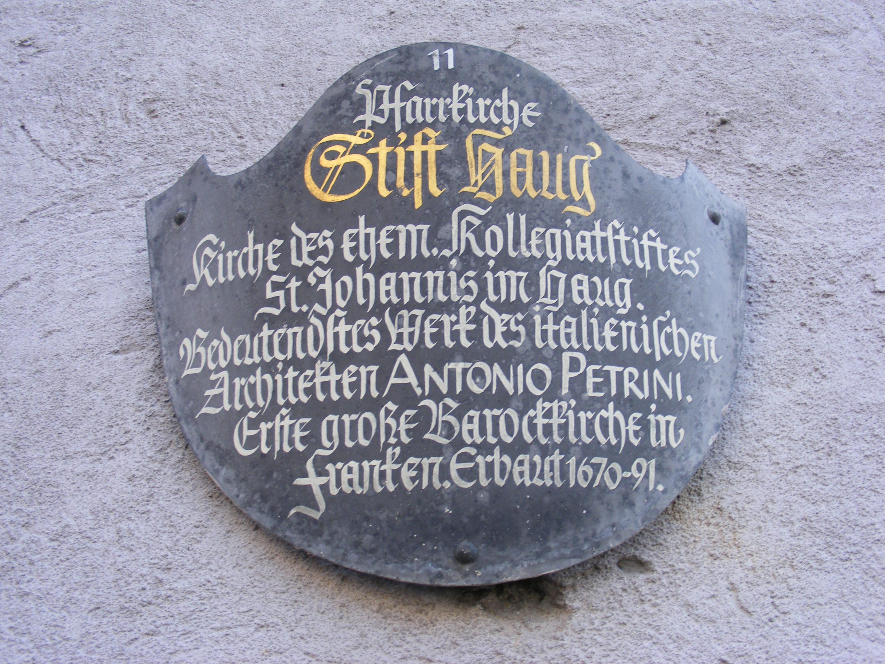 Pfarrkirche Stift Haug, Würzburg (Schild).